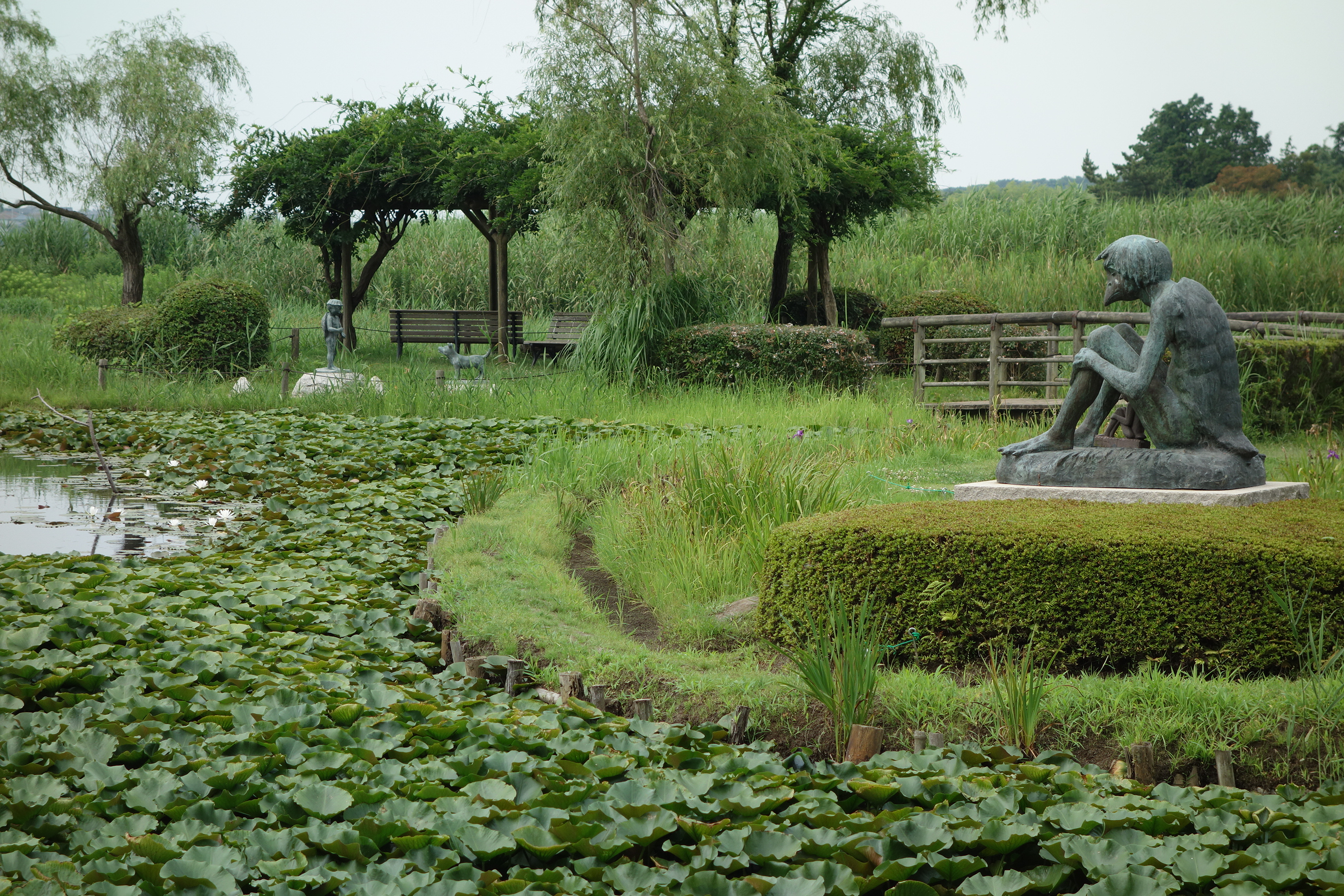 アヤメ園 (iris garden)